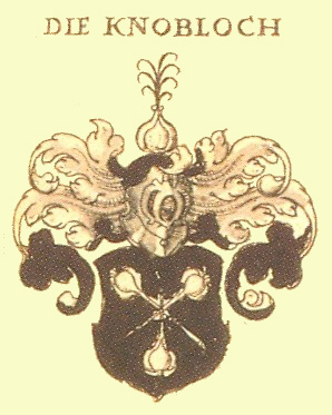 Wappen der Frankfurter Patrizierfamilie Knoblauch (auch: Knobloch)